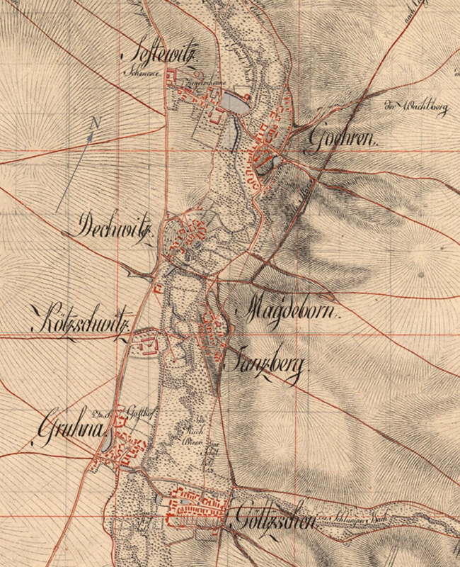 Karte von Magdeborn um 1800 (Ausschnitt aus Meilenblätter von Sachsen 1780-1806)